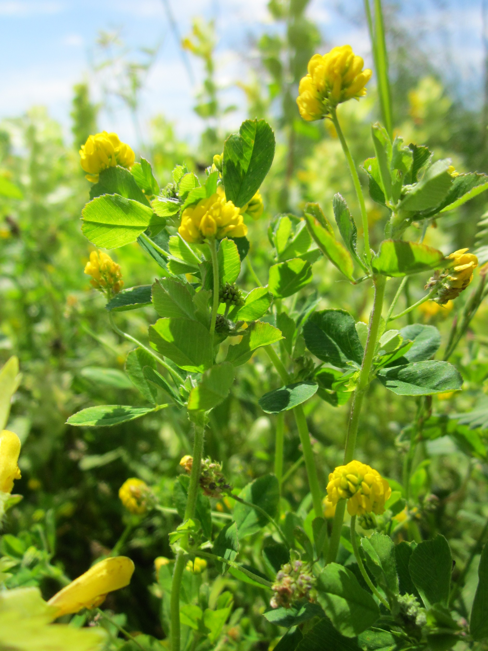 Hopfenklee (Medicago lupulina) im Hockenheimer Rheinbogen